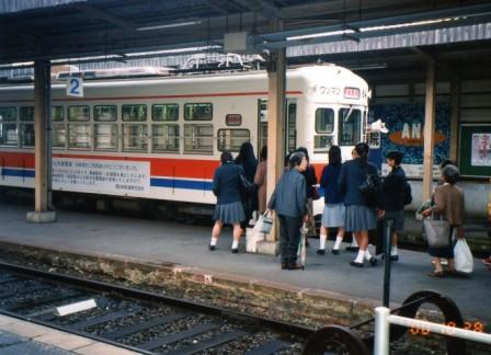 西鉄折尾駅ホーム